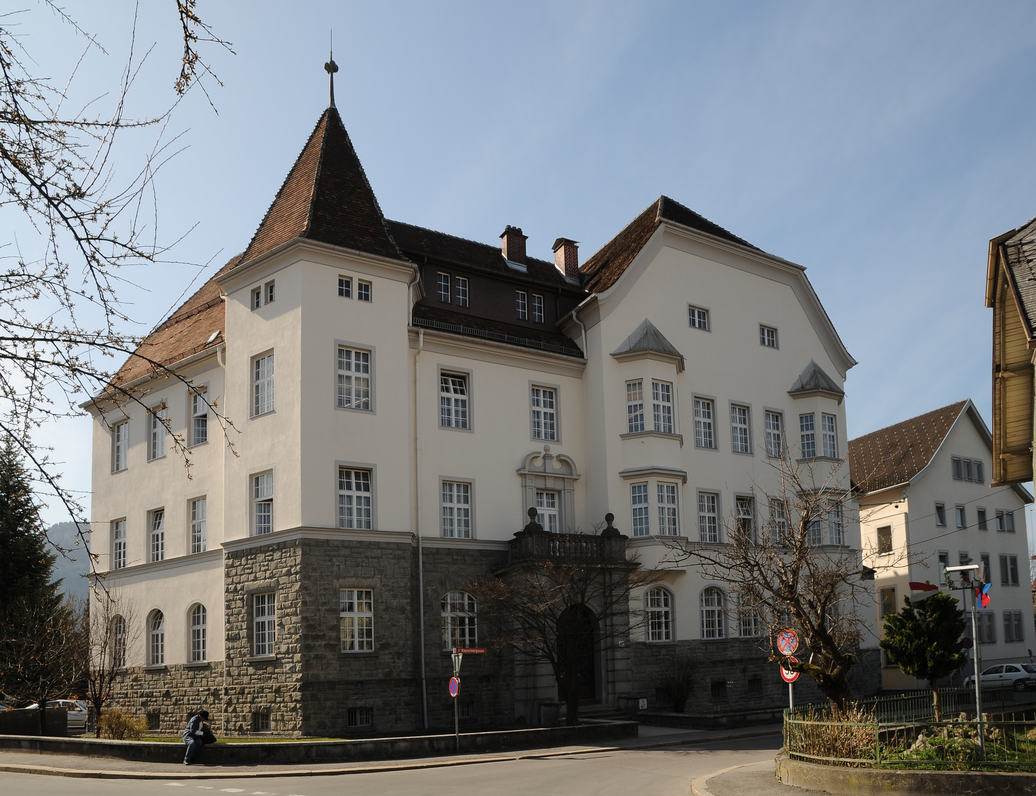 aus dem DEHIO Vorarlberg 1983: Kapuzinergasse Nr.12 Bezirksgericht Heimatstilbau, erbaut um 1910; reiche Dachpartie; polygonaler Erker; über antikisierendem Eingang mit gekröpftem Gebälk Loggia mit Balustern, Fenstertür mit Ädikularahmung. In Dornbirn.